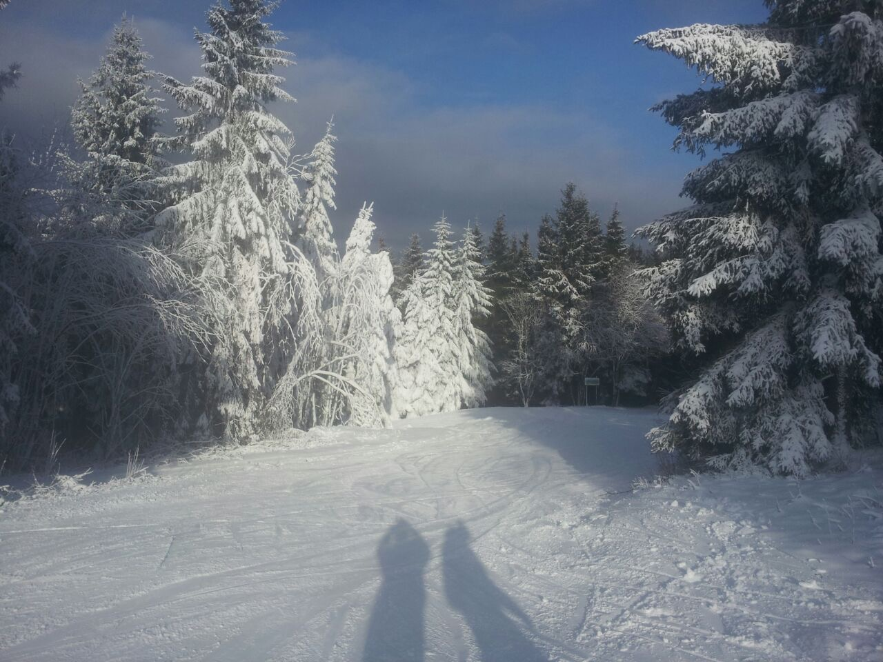 Esquí en Alemania, nieve perfecta para los deportes extremos